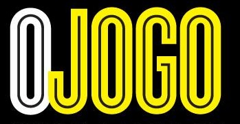 O logotipo do Jornal "O Jogo"